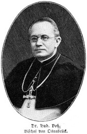 Hubertus Voß (1841-1914). Historische Fotografie aus der Zeit vor 1914.